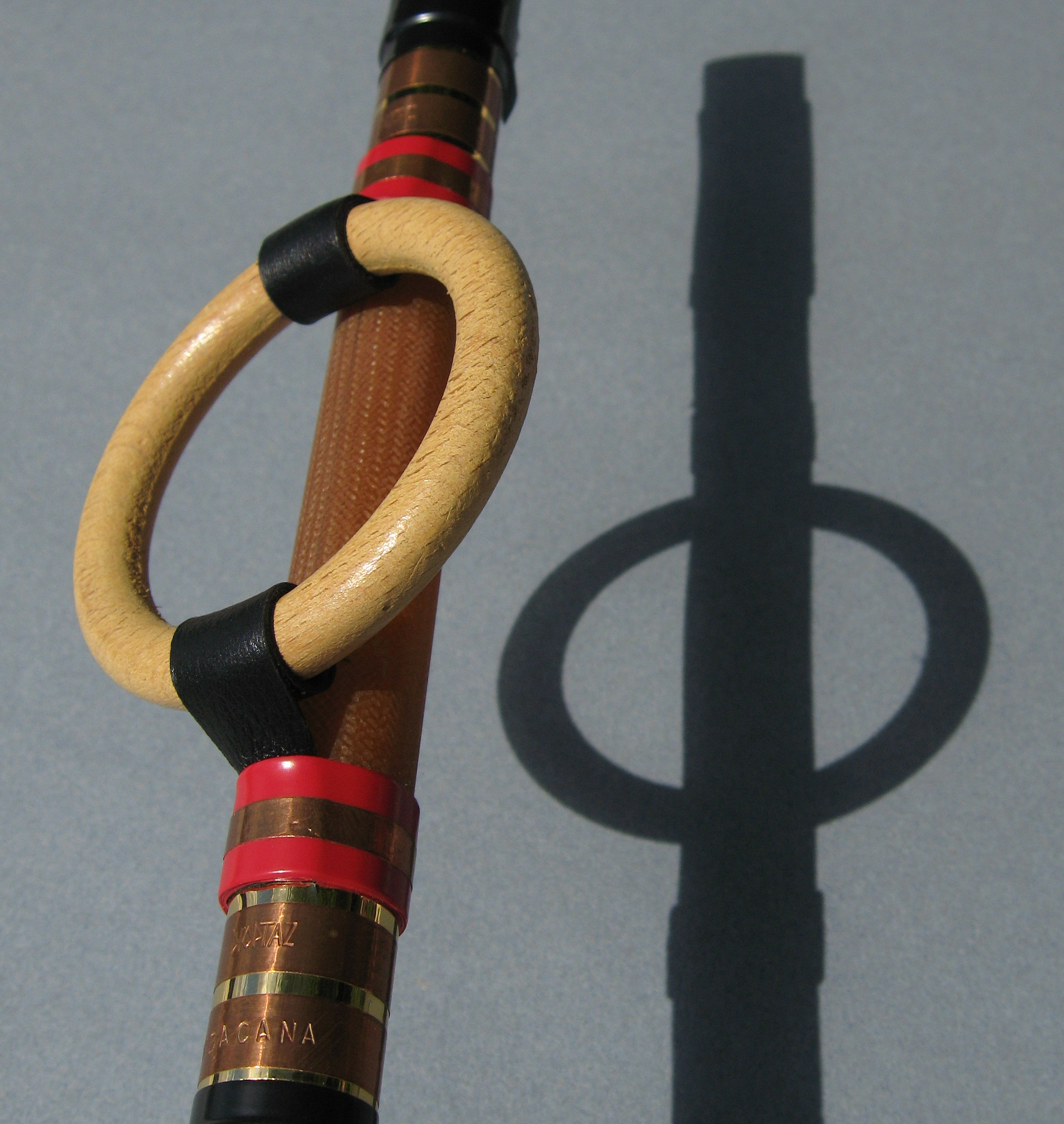 L’usage du « PHI » de l'école du souffle "Sarbacana" est un procédé impliquant un tout autre protocole de lecture que les modes habituels de visée. Le principe étant de mettre en synergie consciente des stimulus captés par des systèmes sensoriels différents. Placer les sensations kinesthésiques en résonances synesthésiques avec la perception visuelle.